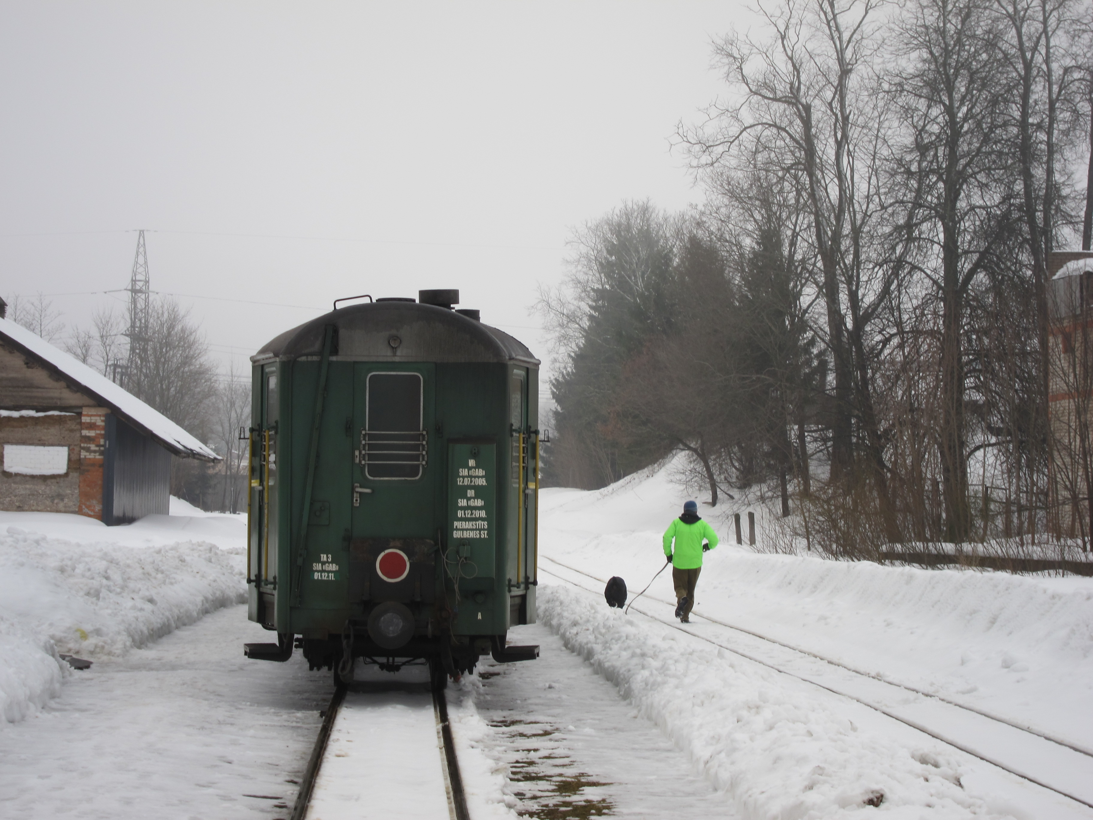 Alūksnes stacija